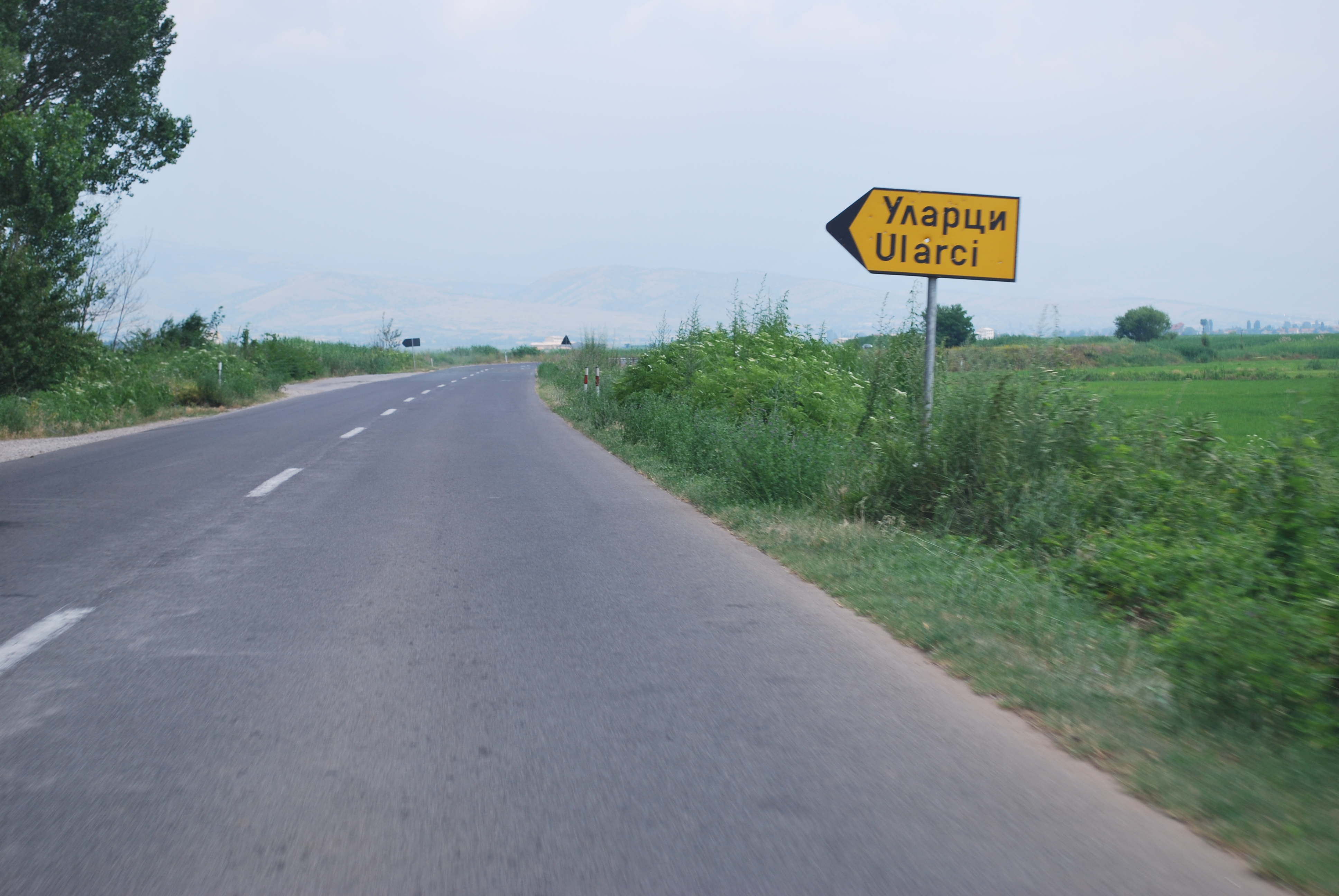 Ularci, Macedonia